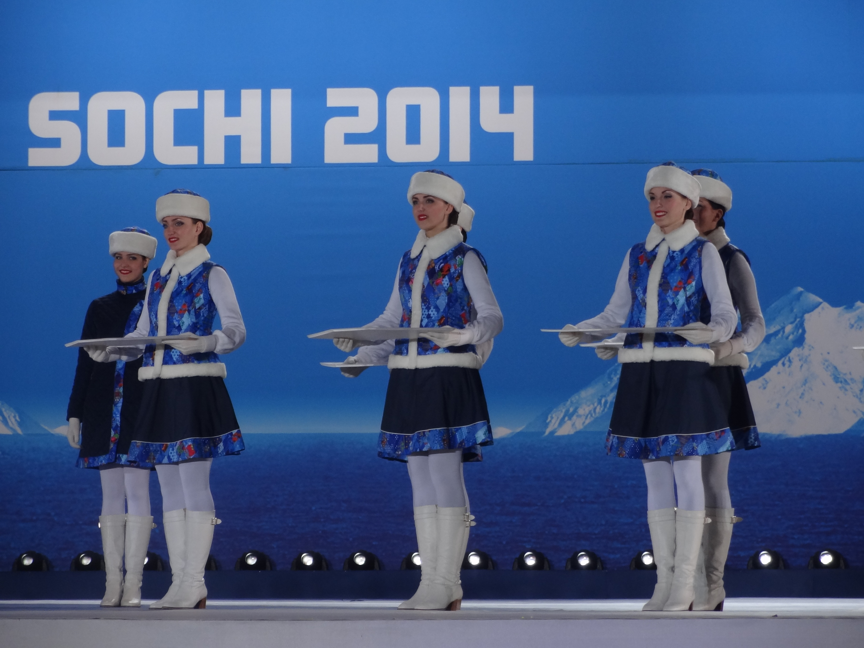 Зимние Олимпийские игры 2014